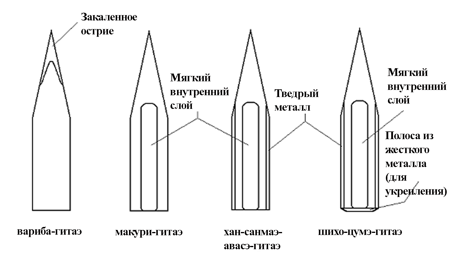 Лезвие катаны в разрезе (схема)